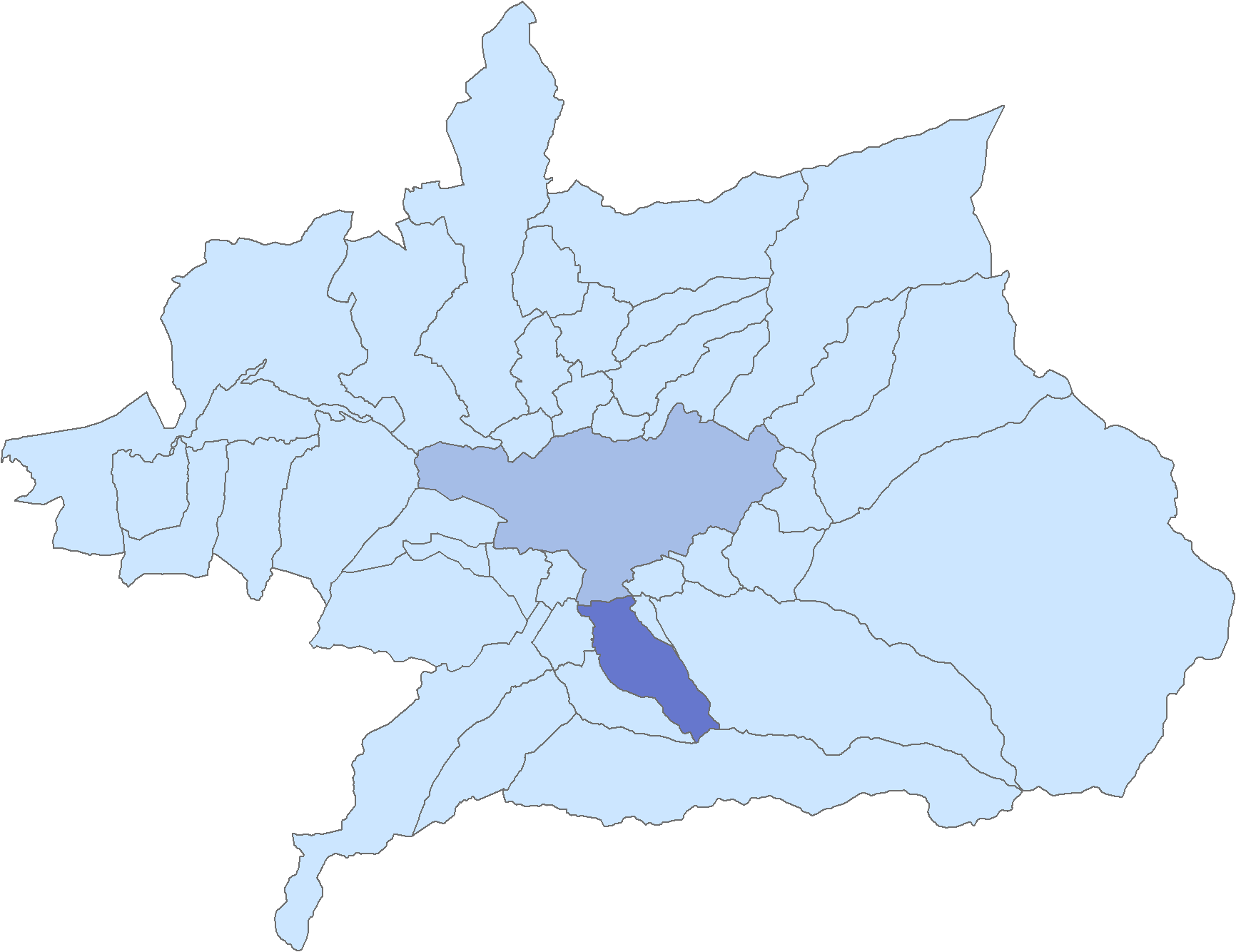 Situación del municipio de La Zubia respecto a la comarca de la Vega de Granada, en España.